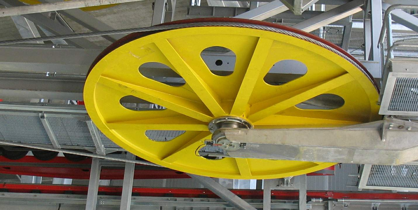 Puleggia di rinvio della stazione a valle della funivia del Renon - 4/2009